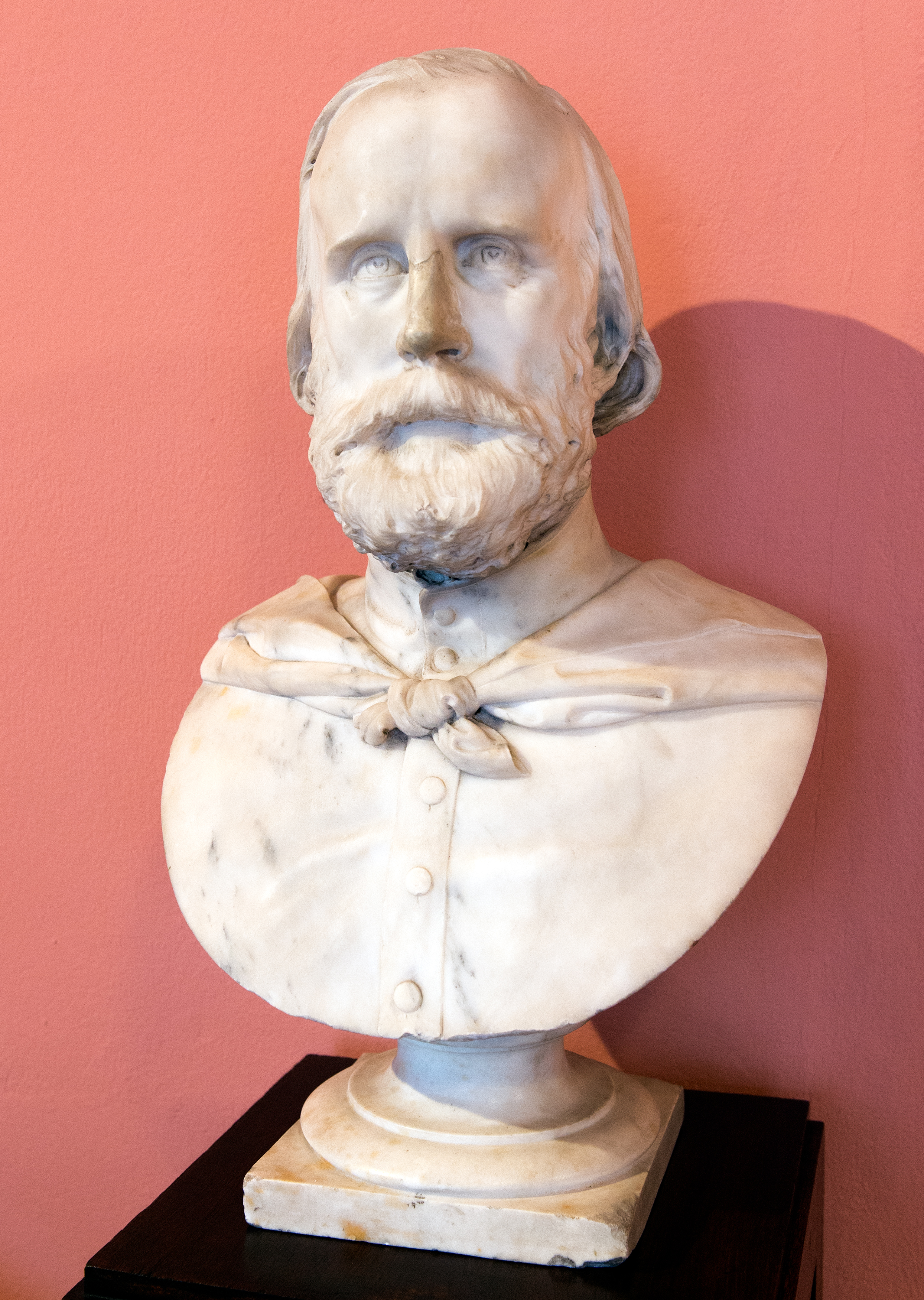 Escultura de José Garibaldi, de autor desconocido. Museo Histórico Nacional - Casa de José Garibaldi, Montevideo, Uruguay